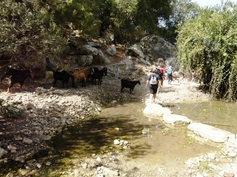 Alon Valley part of Oren Wadi. Mount Carmel, Israel בקעת אלון היא בקעה באפיק נחל אורן בהר הכרמל . הבקעה משתרעת מזרחית לעספיא ותחילתה באזור בו נשפך נחל חיק לנחל אורן Alon Spring עין אלון